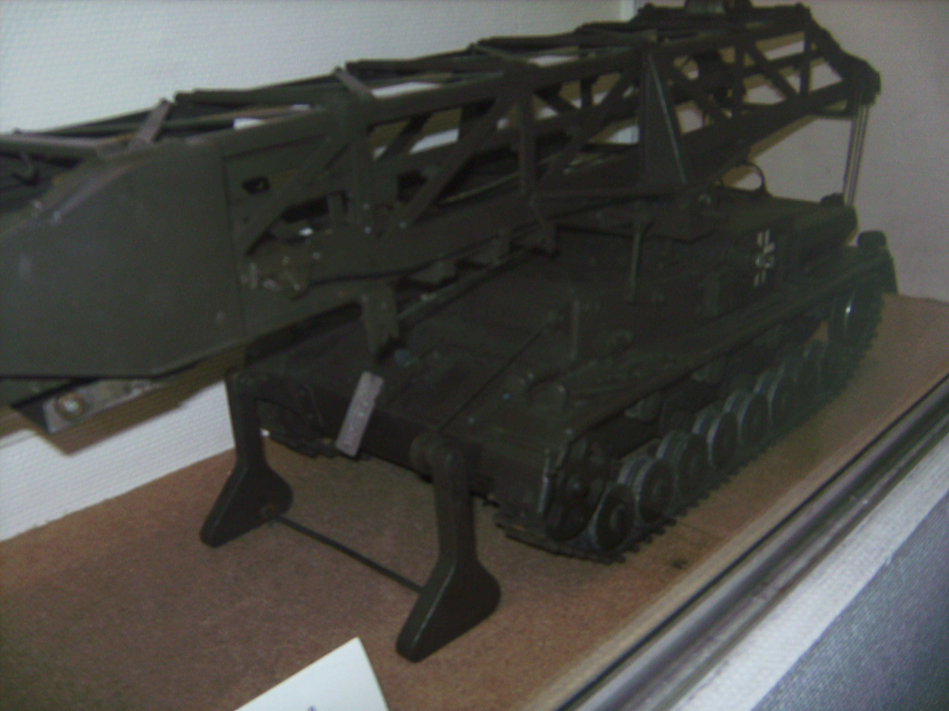 Modell eines Stegpanzer IV in der Wehrtechnischen Studiensammlung in Koblenz